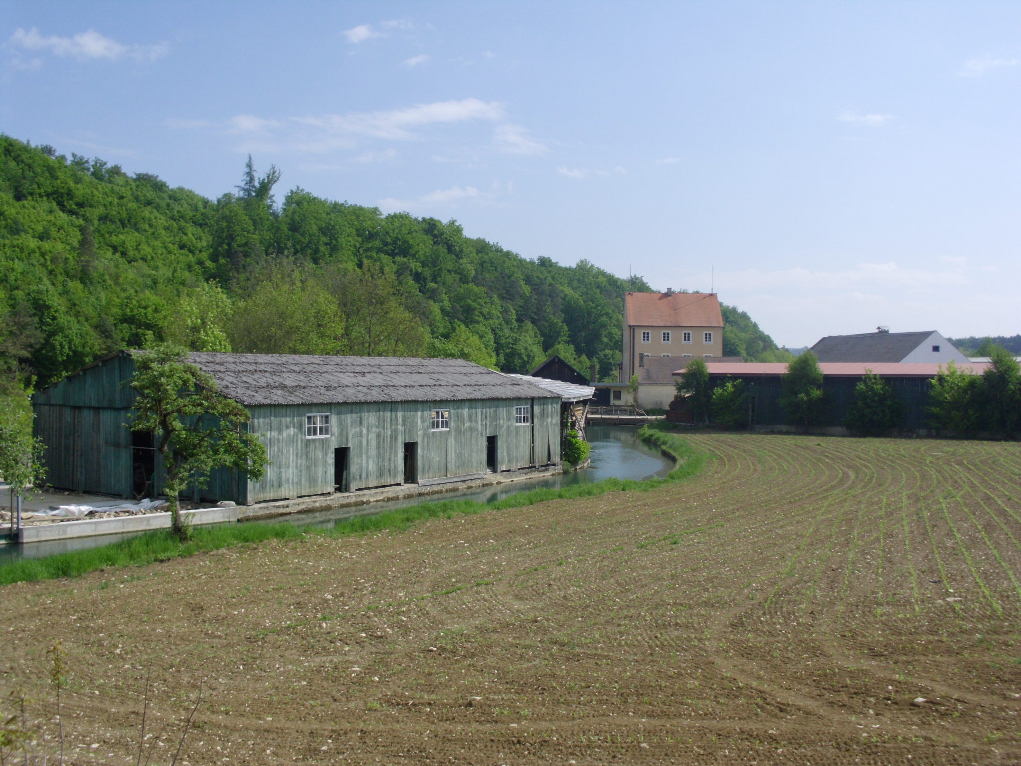 Schürmühle im Möhrenbach-Tal, Ortsteil der Stadt Treuchtlingen im mittelfränkischen Landkreis Weißenburg-Gunzenhausen (Bayern)